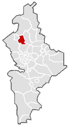 Ubicación geográfica del municipio de Villaldama en el estado mexicano de Nuevo León.